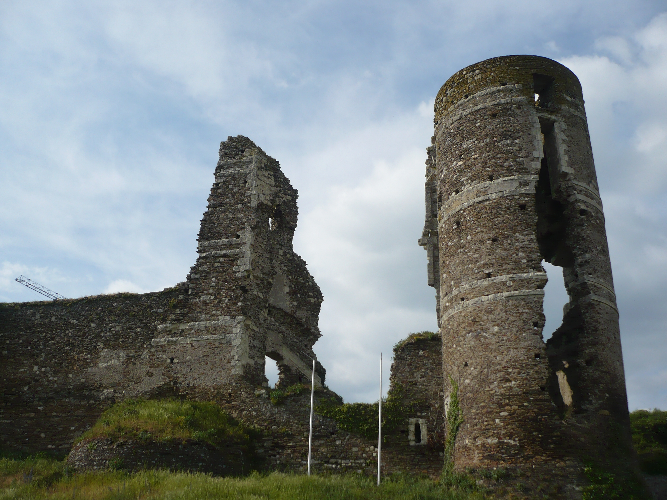 Vue du château de Champtocé sur Loire